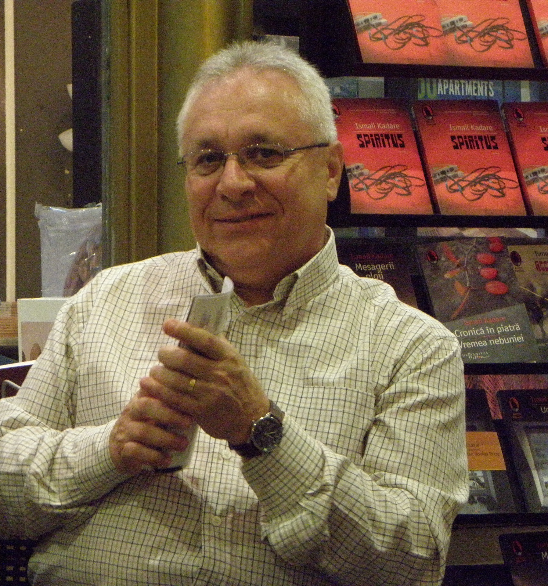 Marius Dobrescu